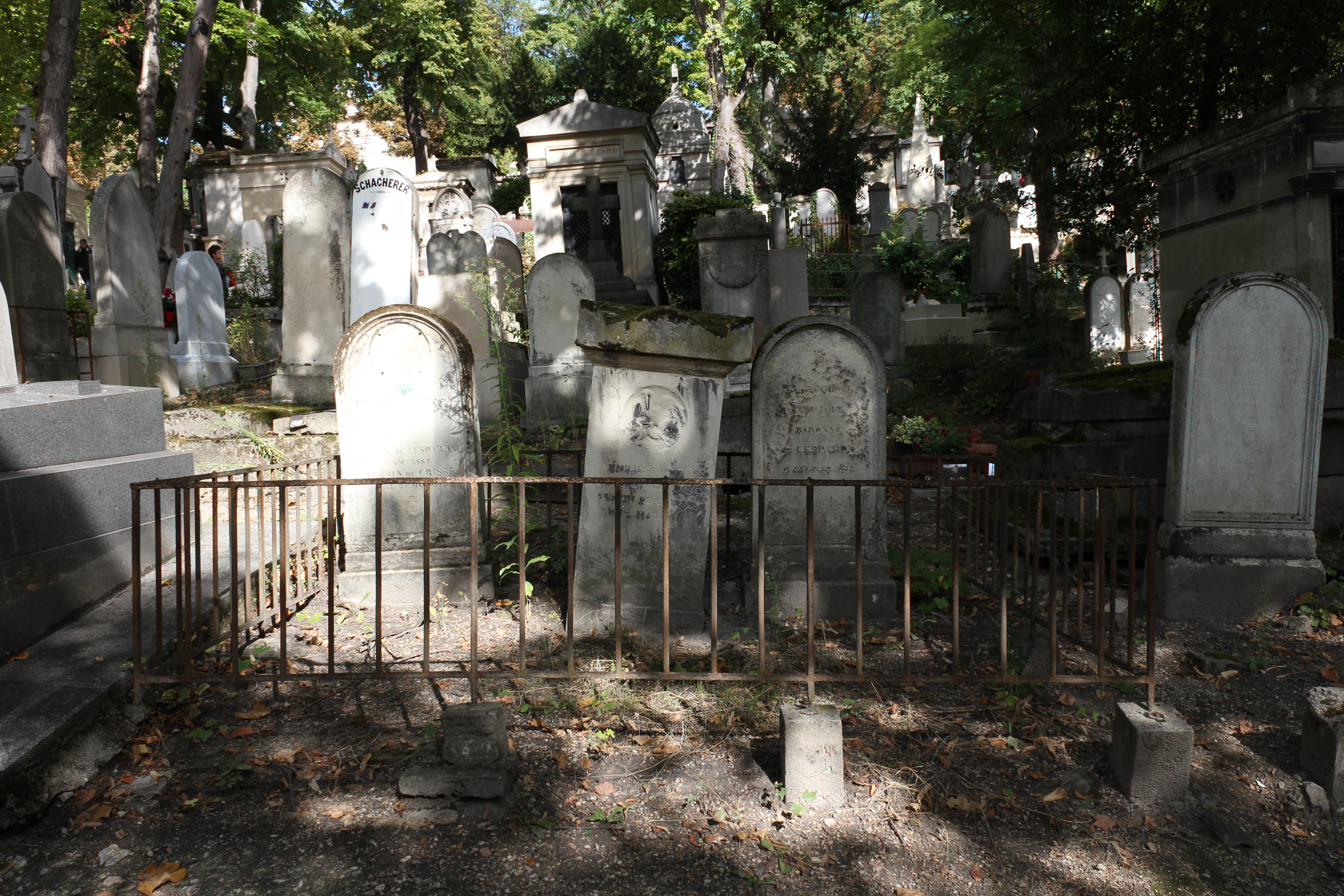 Sépulture d'Émilie-Sophie de Montullé (1756-1816), marquise Turpin de Crissé, artiste peintre et épouse d'Henri-Roland-Lancelot Turpin de Crissé ; son fils, Lancelot-Théodore Turpin de Crissé (1782-1859), peintre et collectionneur d'art ; sa belle-fille Anne-Pauline-Adélaïde de Lesparda (1789-1861) ; Adélaïde Haudry de Soucy (1769-1837), mère d'Anne-Pauline-Adélaïde de Lesparda. Sépulture constituée de deux stèles et d'un cippe, le tout entouré d'une grille. À l'origine un médaillon était encastré dans la face antérieure de la stèle située à gauche. Le médaillon représente Lancelot-Théodore Turpin de Crissé, tête nue, de profil à droite. Un exemplaire en bronze de ce médaillon est au Musée d'Angers. La face antérieure du cippe est décoré d'un pélican nourrissant ses petits de son propre sang.